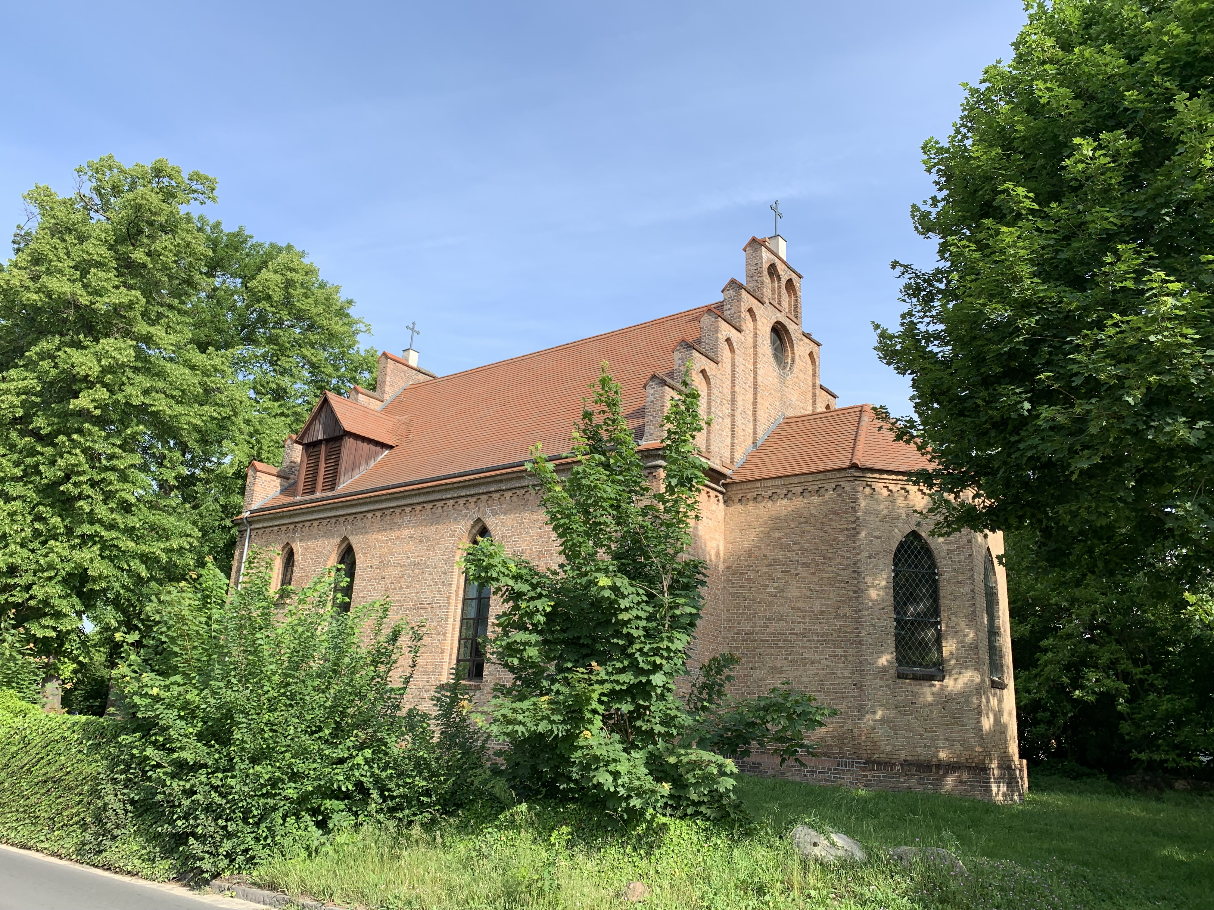 Die Dorfkirche Schuzendorf der gleichnamigen Gemeinde im Landkreis Dahme-Spreewald ist eine neugotische Saalkirche aus der zweiten Hälfte des 19. Jahrhunderts.